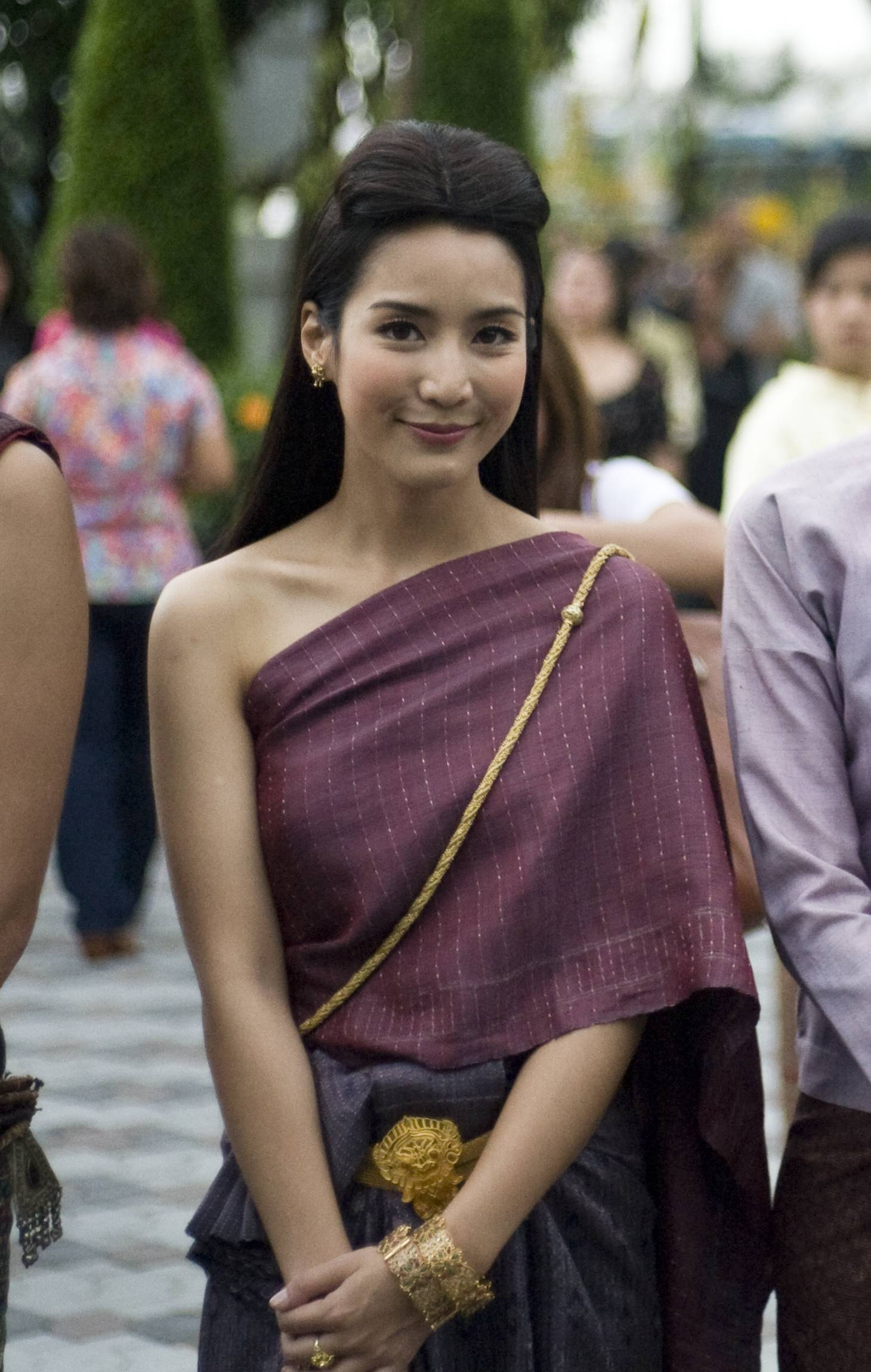 อคัมย์สิริ สุวรรณศุข (รัตนาวดี) / นายกรัฐมนตรี แถลงข่าวรัฐบาลสนับสนุนการสร้างภายนตร์ตำนานสมเด็จพระนเรศวรมหาราช ภาค 3 และ 4 "สงครามยุทธหัตถี" ณ ศูนย์วัฒนธรรมแห่งประเทศไทย 8สิงหาคม2552 (The Official Site of The Prime Minister of Thailand Photo by พีรพัฒน์ วิมลรังครัตน์)